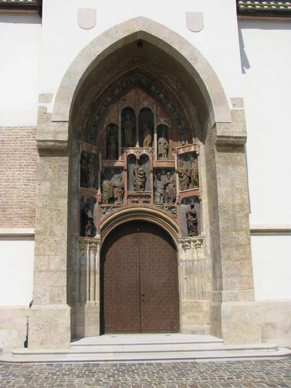 Južni portal Crkve sv. Marka u Zagrebu, nakon obnove